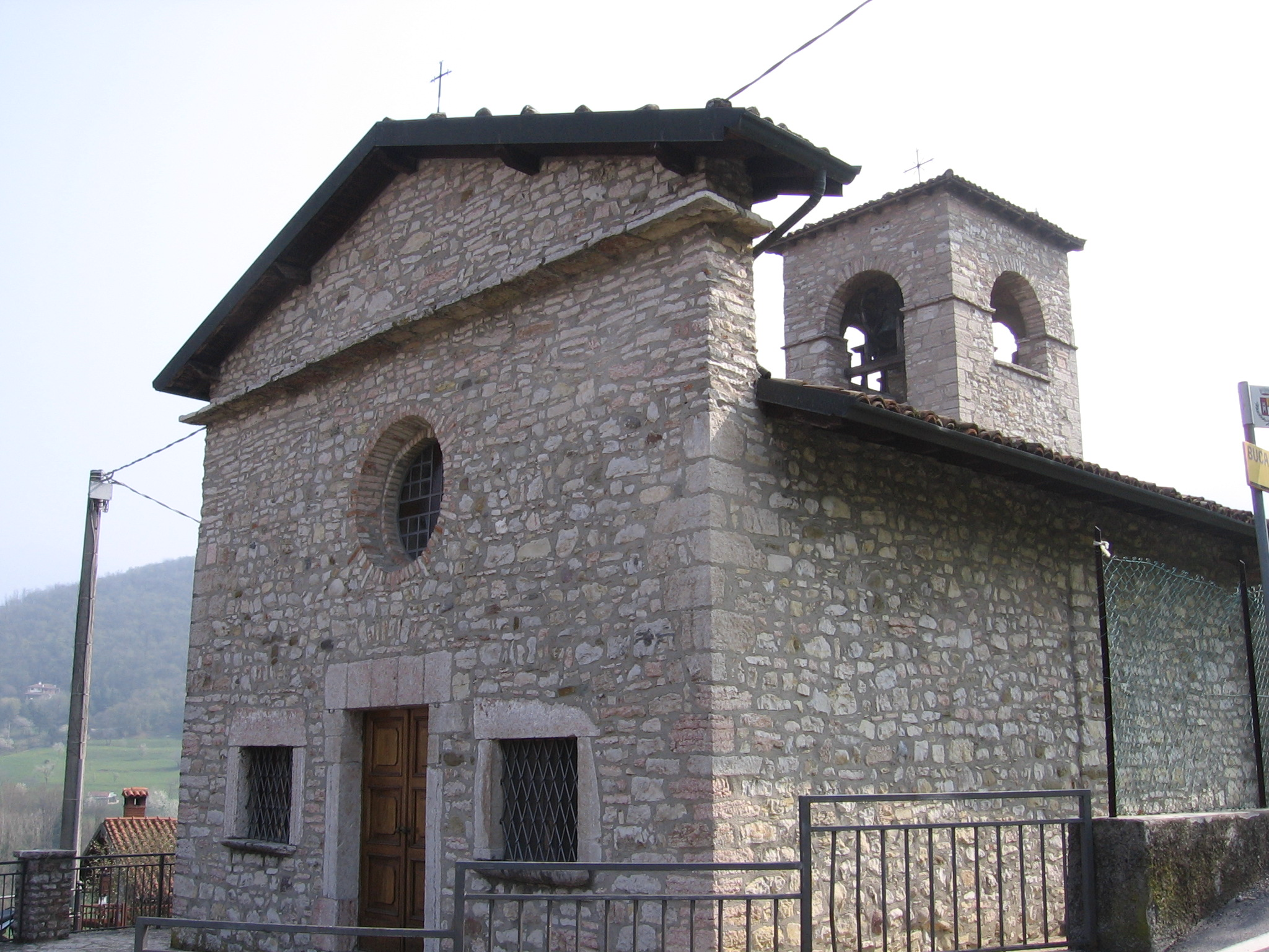 Entratico, Bergamo, Italia